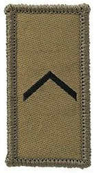 Korporal